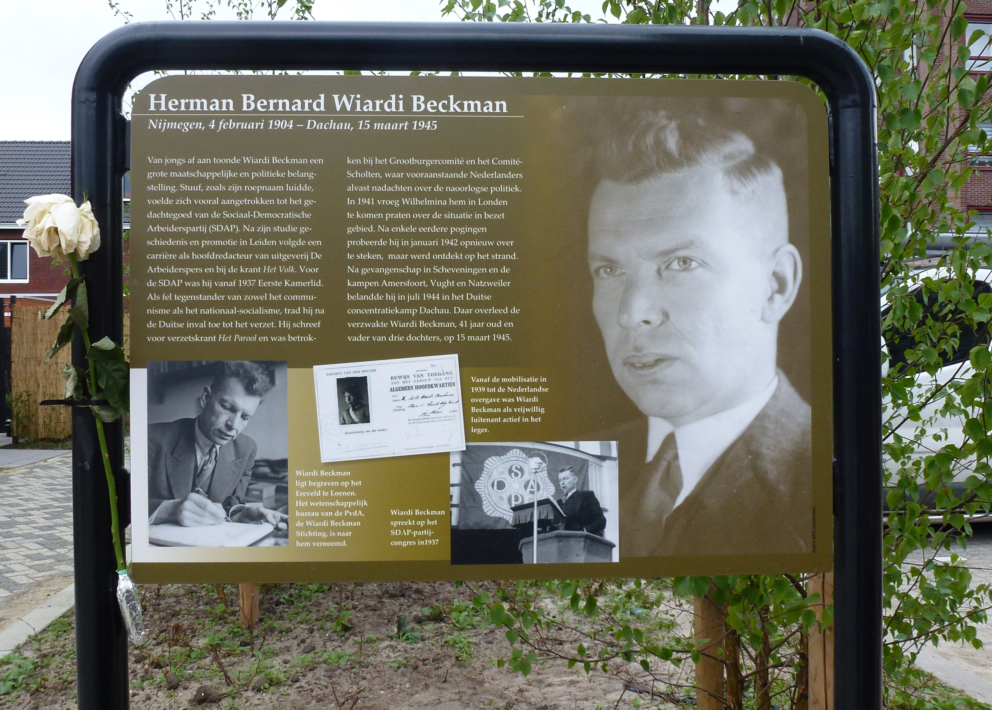 Herman Bernard Wiardi Beckman. Op 10 april 2014 zijn in Oosterwei 10 van in totaal 16 borden met informatie over verzetsstrijders onthuld. In Oosterwei, een wijk in Gouda, zijn na de 2e wereldoorlog, de wederopbouw, 16 straten vernoemd naar verzetsstrijders. Veel bewoners van deze straten wisten maar weinig over de verzetshelden waarnaar de straten vernoemd zijn. Zij en anderen hebben er voor gezorgd dat nu in iedere straat een informatiebord staat, zodat de gedachtenis aan deze strijders levend blijft. (De overige 6 borden zijn in april 2018 geplaatst)